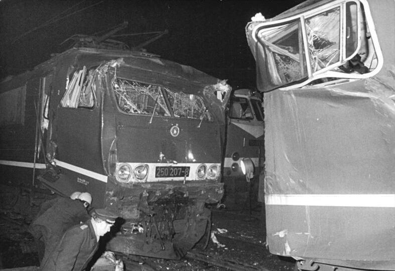 ADN-ZB Lehmann 29.2.1984 Halle: Schweres Zugunglück Ein folgenschweres Zugunglück ereignete sich auf dem Bahnhof Hohenthurm in der Nähe von Halle. Bei dichtem Nebel fuhr der D 345 Berlin-Saarbrücken auf einen haltenden Personenzug auf, an dem eine Lokomotive angekoppelt war. Dabei kamen nach bisher vorliegenden Informationen der Lokführer und zwei Reisende des Personenzuges ums Leben, 43 Personen erlitten Verletzungen. weiteres siehe ADN-Meldung